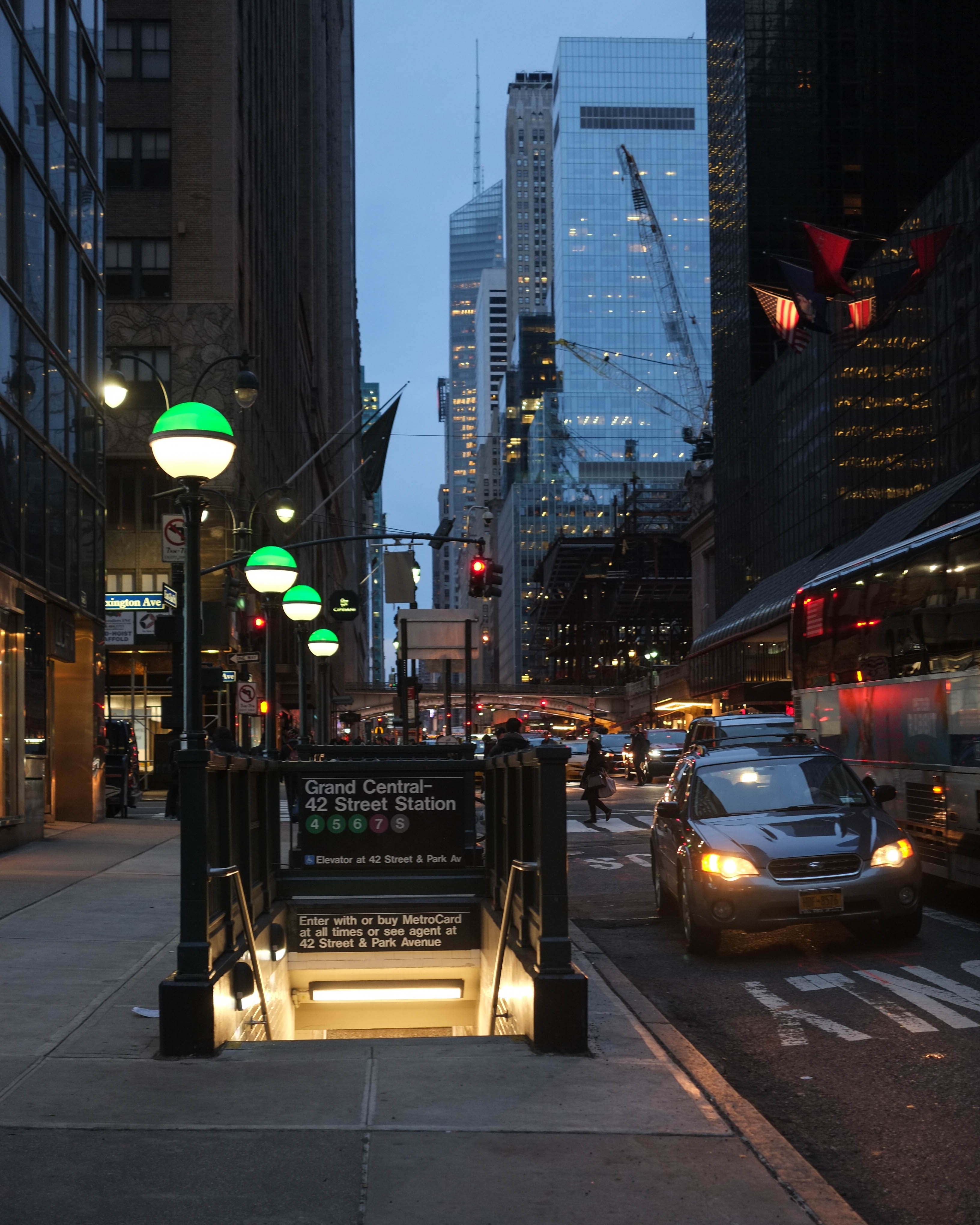 Manhattan